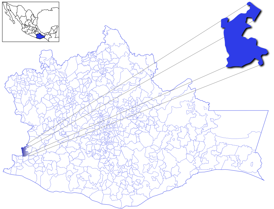 Mapa del municipio de San Juan Cacahuatepec, Oaxaca, Mèxico.